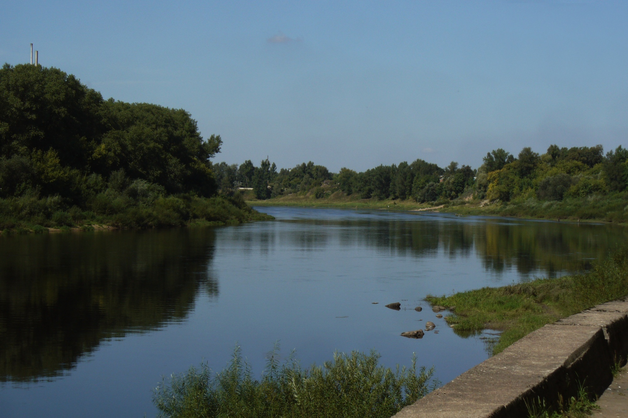 Река Западная двина в черте города Витебска. лето 2009 года.